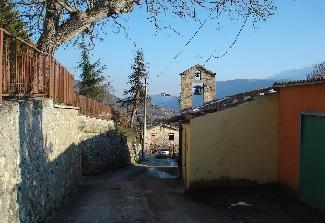 Il borgo medievale di Frascara visto dall'interno.